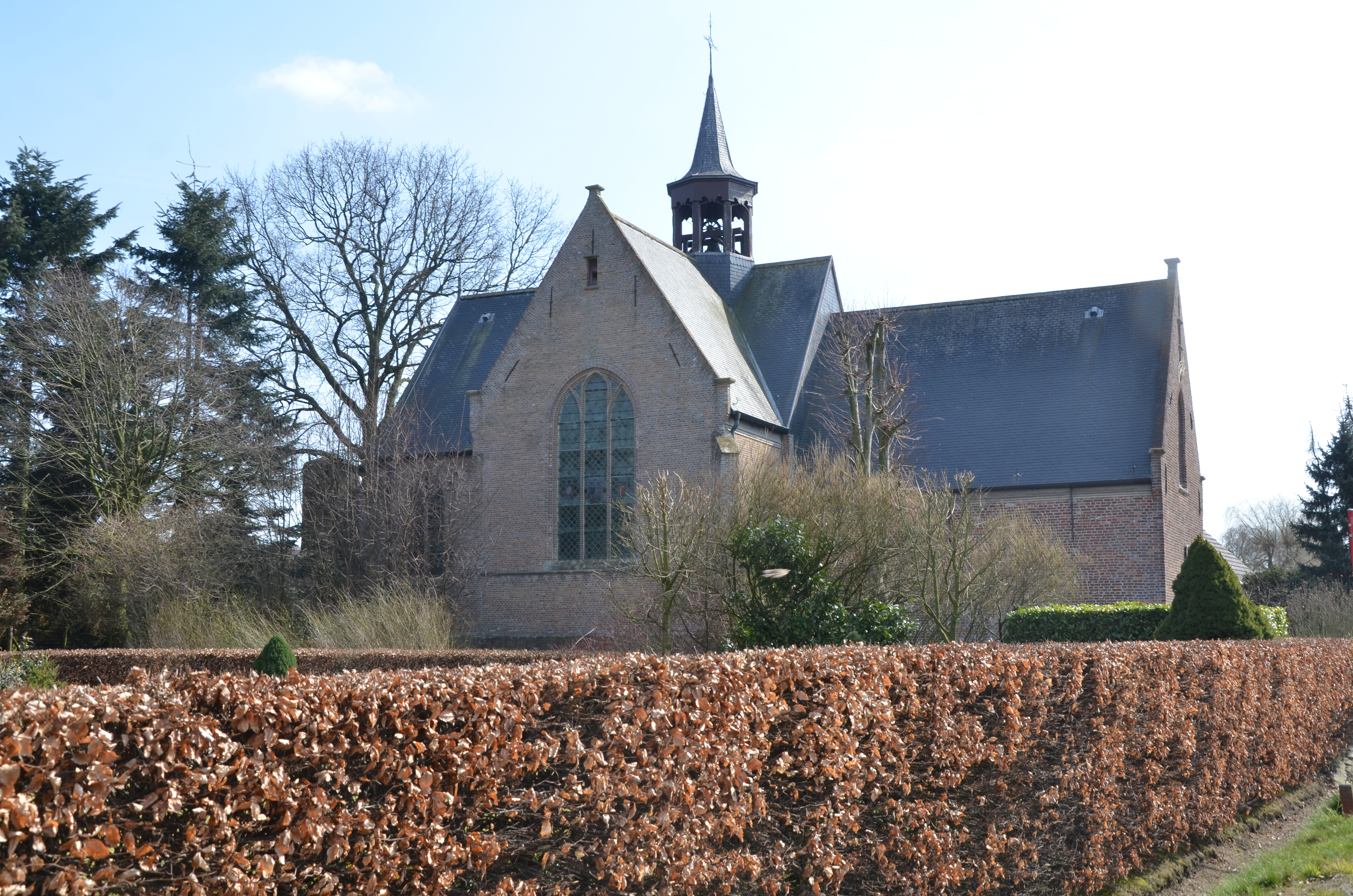 Sint-Luciakapel, Meerle-Dreef, Hoogstraten